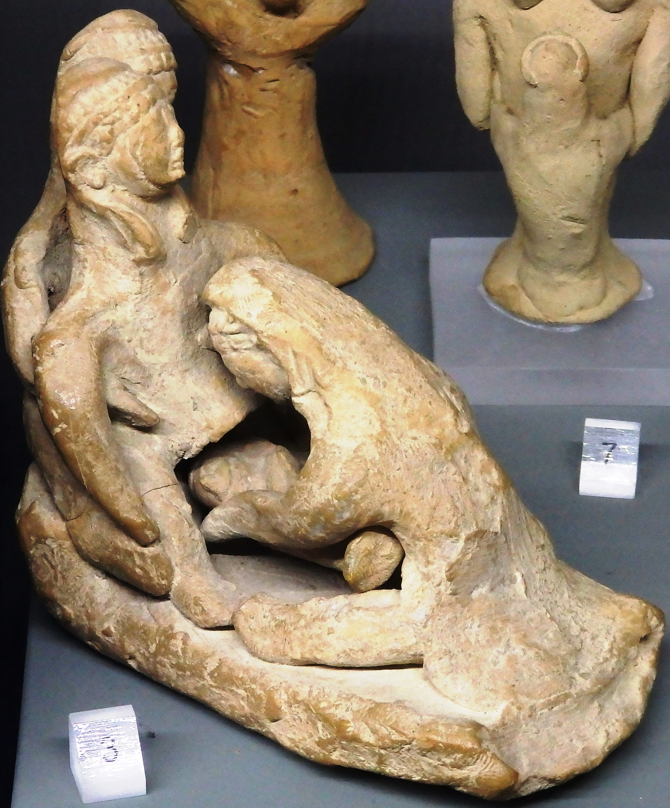 Terrakottafigurengruppe mit Geburtszene, zypro-archaisch (750-475 v. Chr), Zypernmuseum